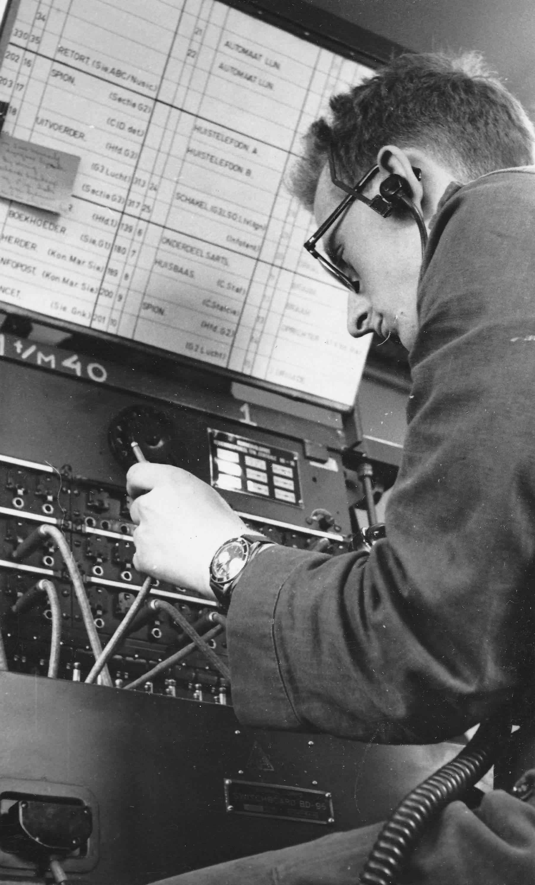 Telefooncentrale in de YA 324 van het 41ste Verbinding, A-compagnie, lijnpeloton.